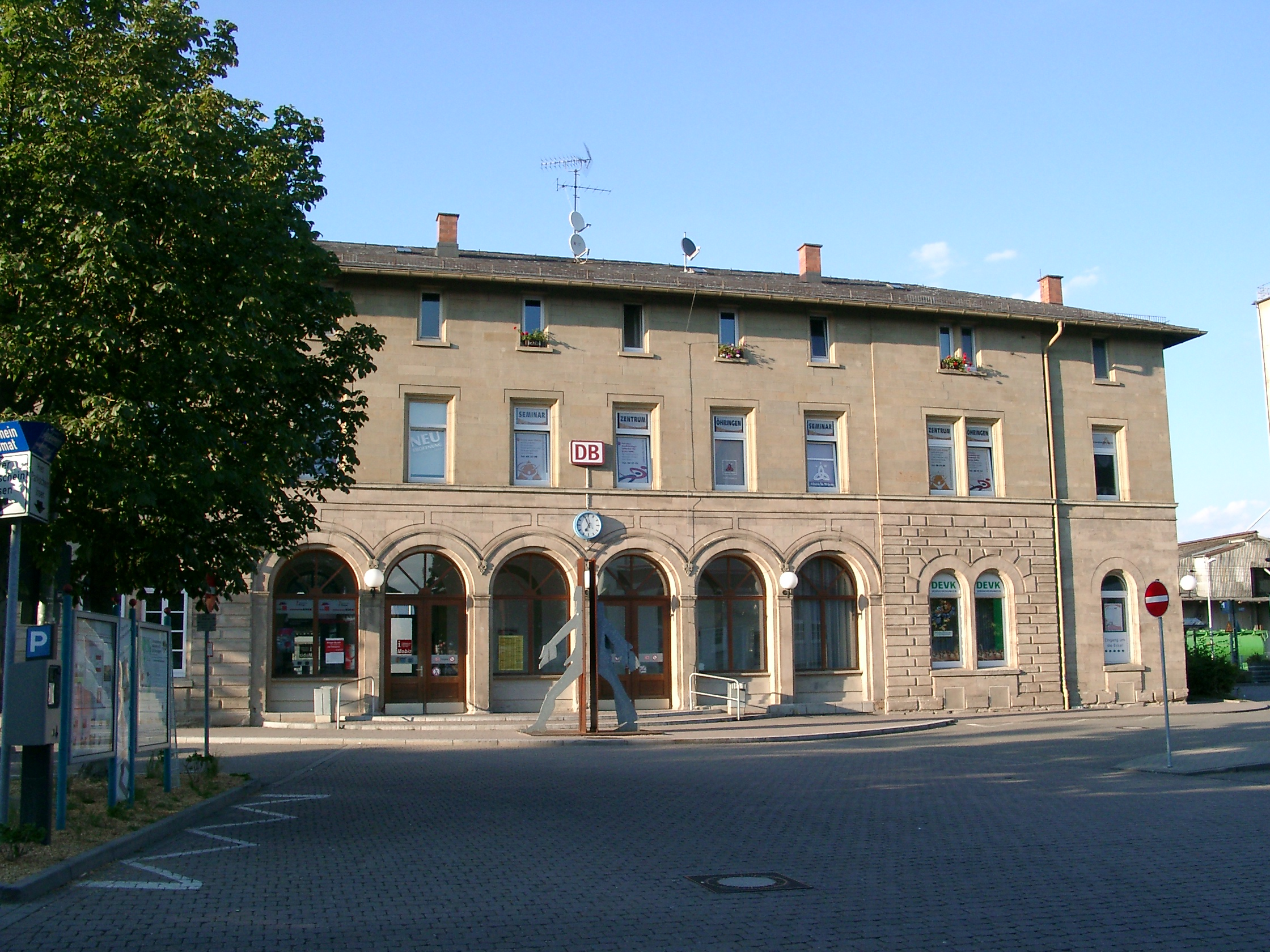 Öhringen, Bahnhof